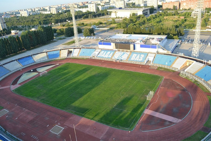 Стадио "Торпедо", Тольятти, Россия